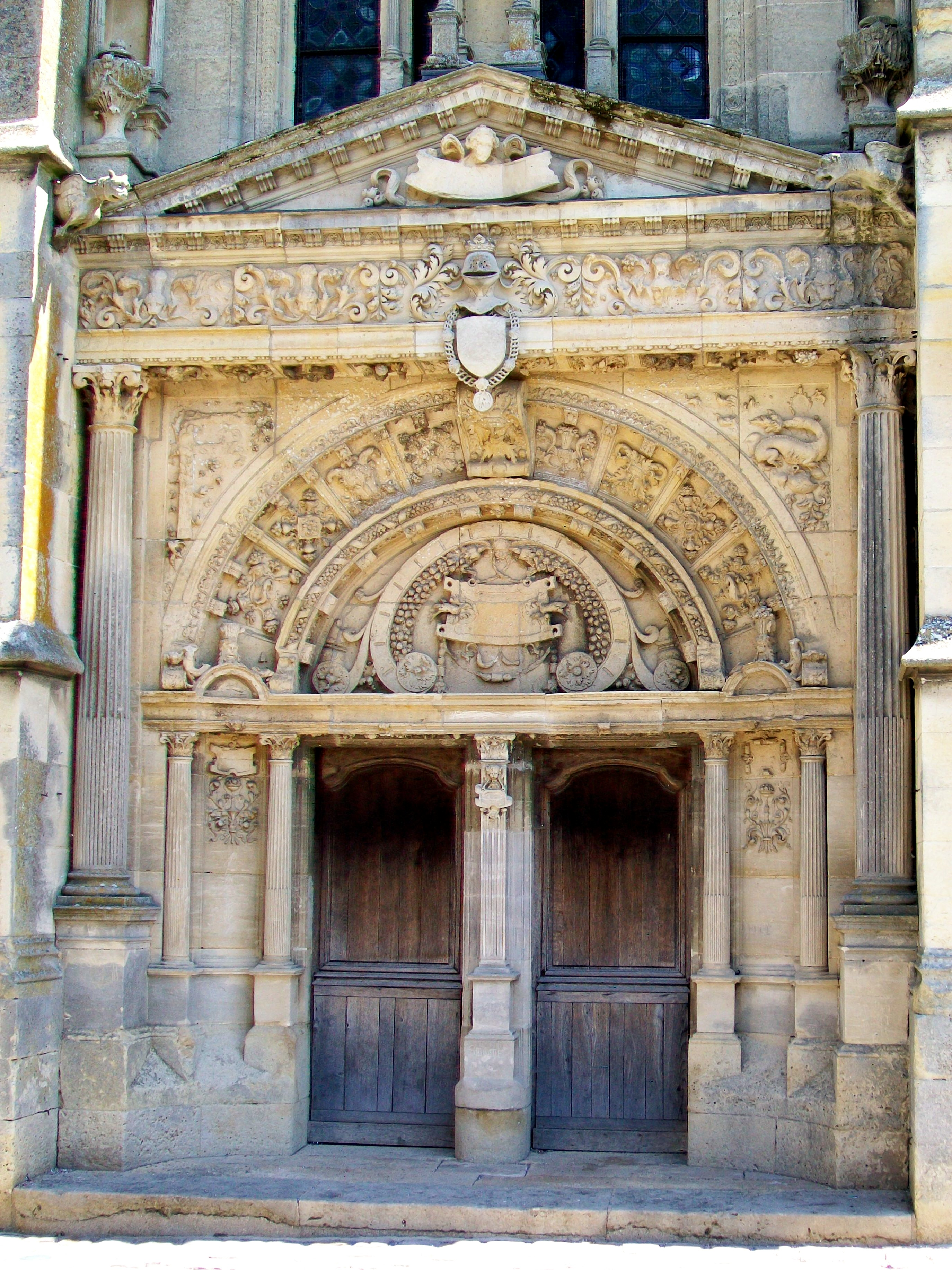 Le portail Renaissance sur la façade sud-ouest, élément architectural le plus remarquable de l'église.